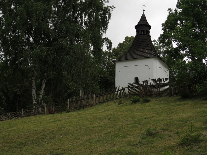 Zvonice, pp. 830/1, Javorník (okres Ústí nad Orlicí).